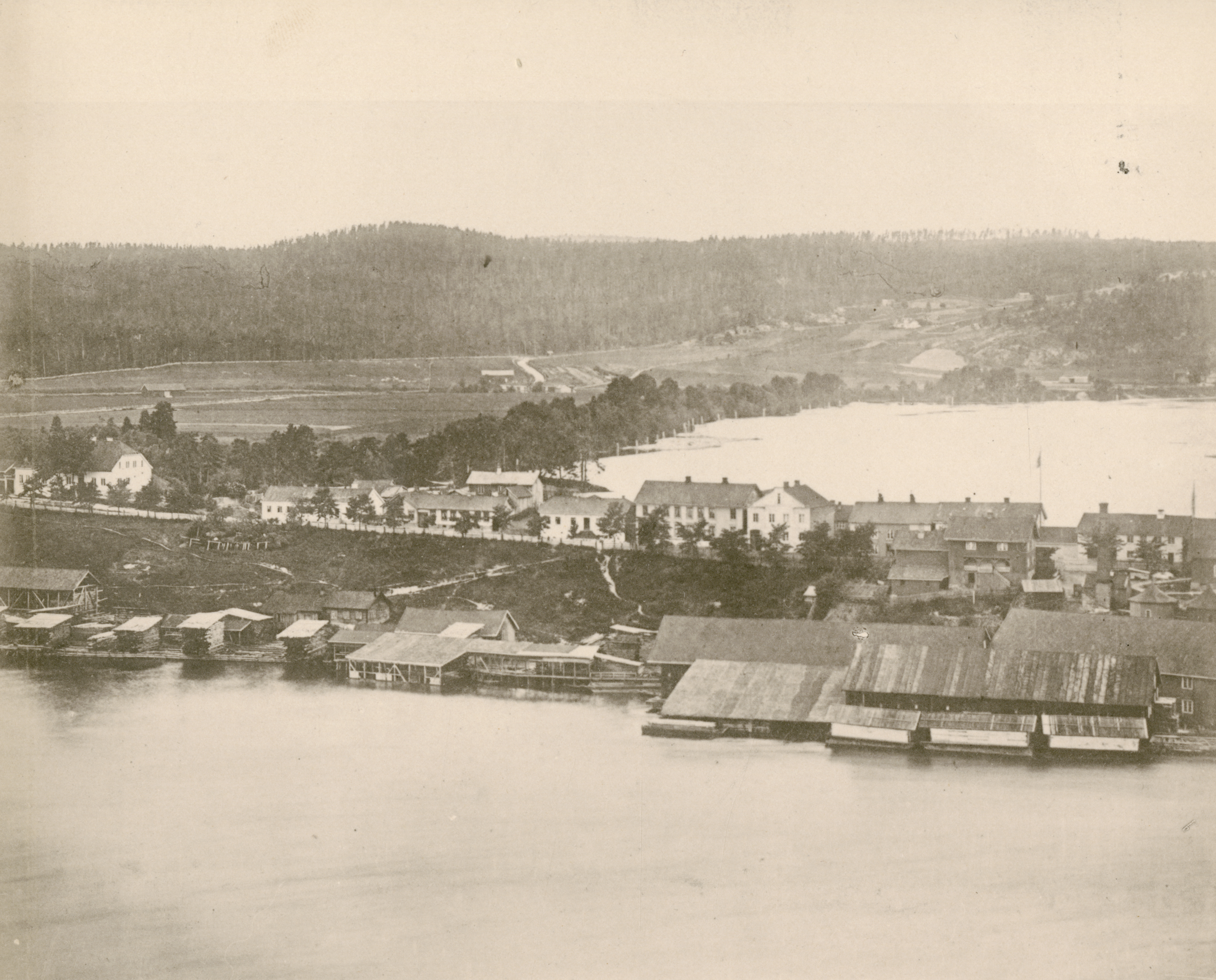 Skien i Skien, Telemark Serie av seks foto som danner panorama av Skien, innbundet med tittelen «Erindring fra Gamle Skien»". De andre numrene er T161_01_0488, T161_01_0489, T161_01_0491, T161_01_0492 og T161_01_0493.